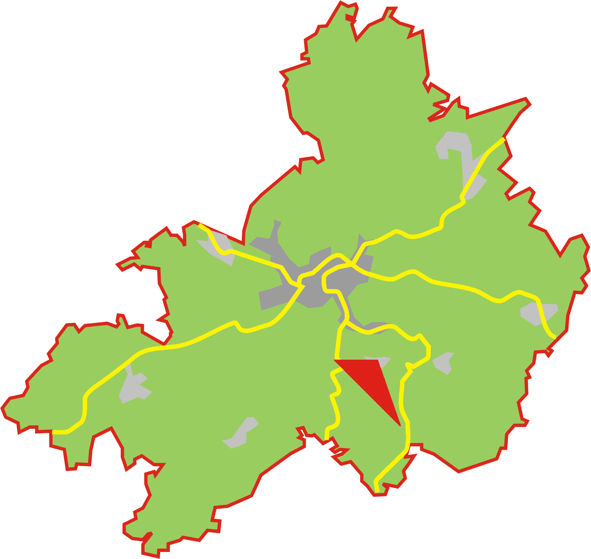 Pos klemenseichen